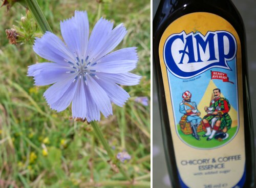 Blodyn yr ysgellog a’r ddiod coeg-goffi a wnaethpwyd ohono.